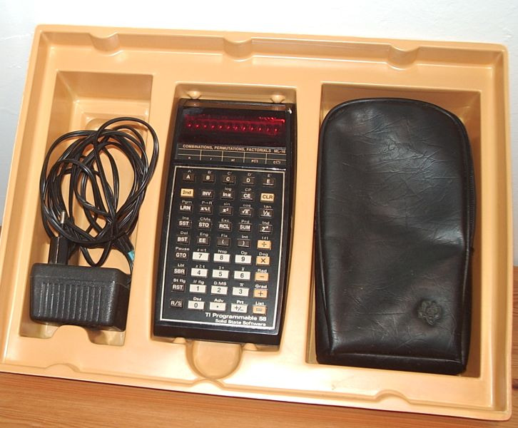 TI-58 in Verkaufsverpackung mit Tasche und Netzteil. Selbst fotografiert und mit The GIMP für Wikipedia aufbereitet. Fotograf: Dirk Meyer Datum der Aufnahme: 8. Oktober 2005